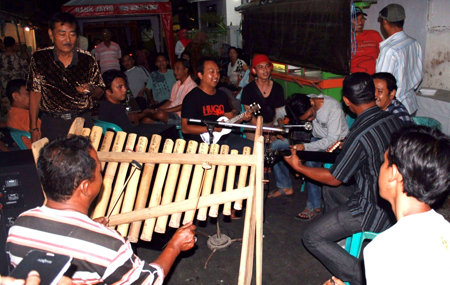 musik keroncong akustik Banyuwangi-an